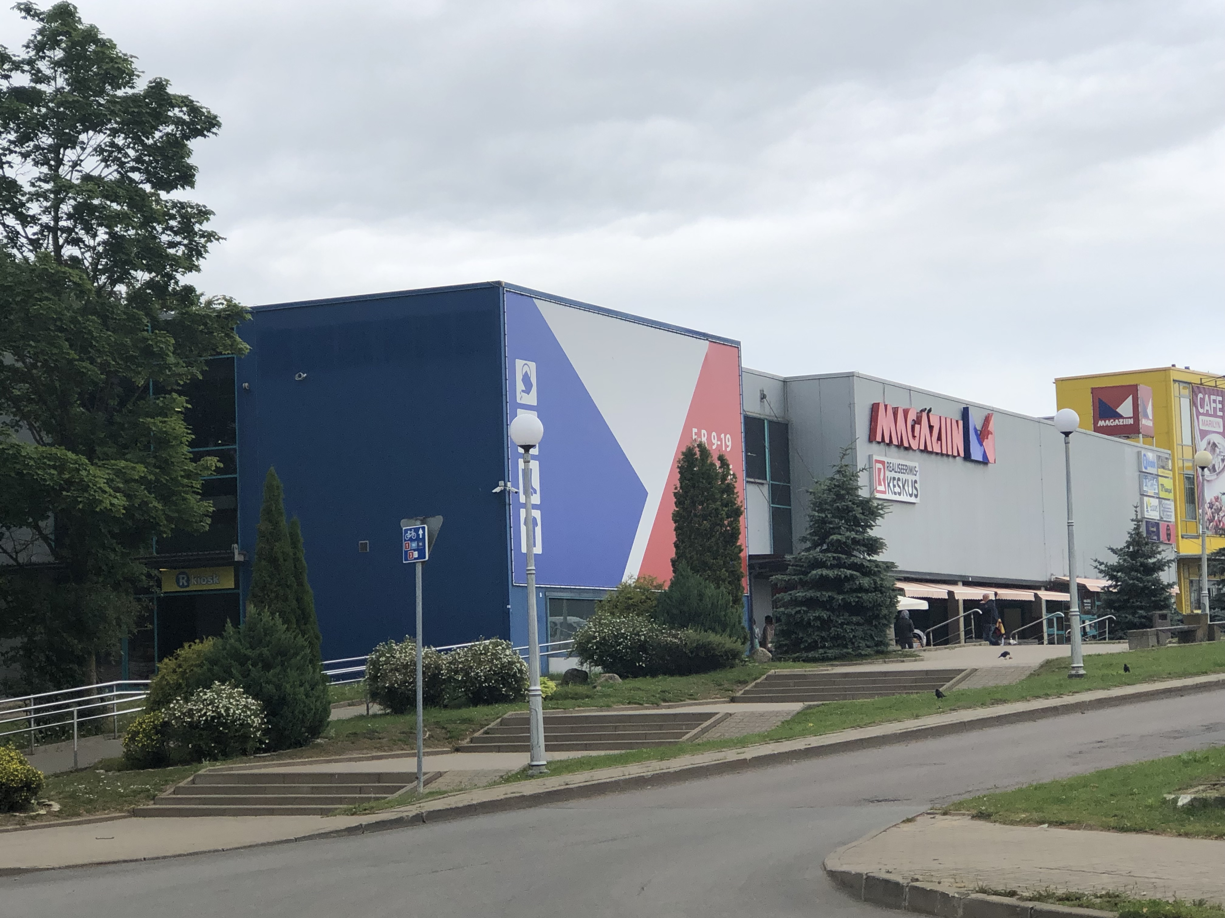 Magazin kauplus Sillamäel